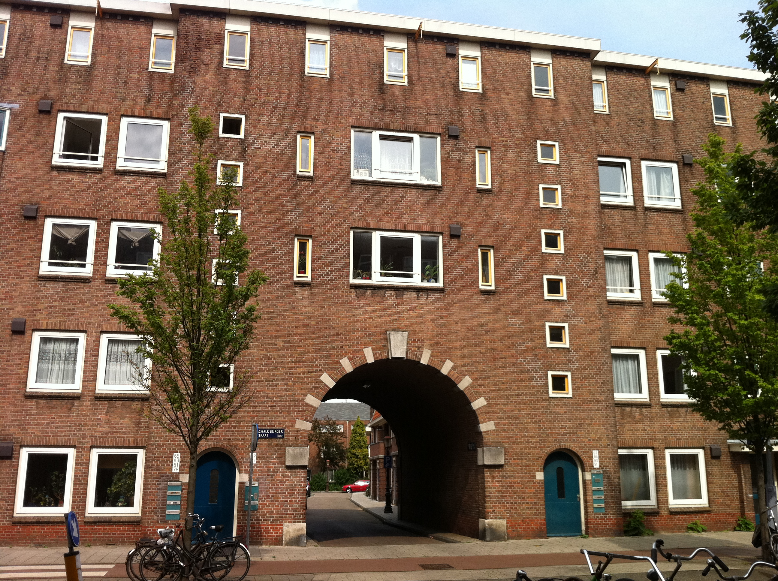 Complex gemeentewoningen in Transvaalbuurt van architect Jan Gratama aan de Schalk Burgerstraat, poort naar Colensostraat